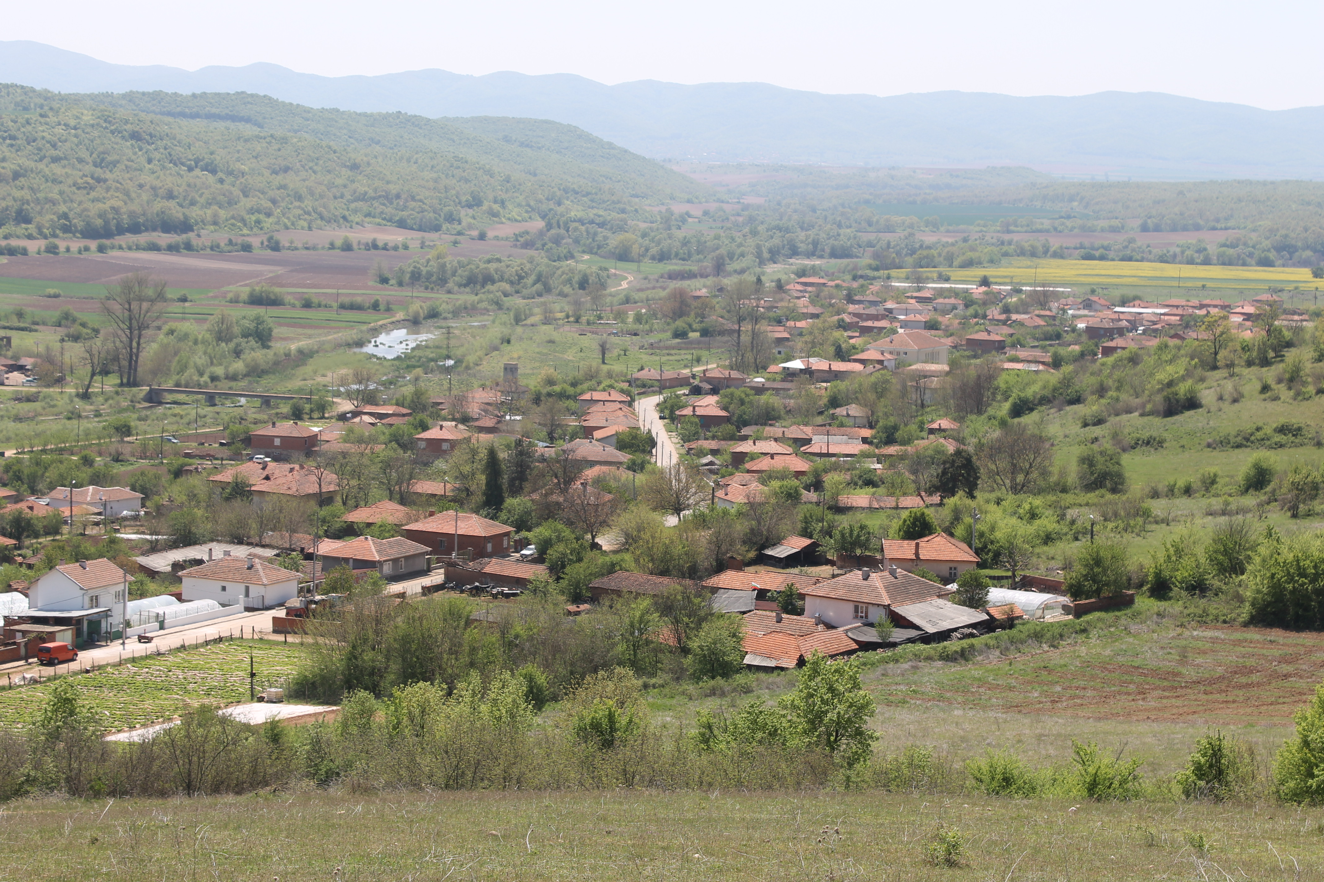 Leshnikovon kylä Bulgariassa